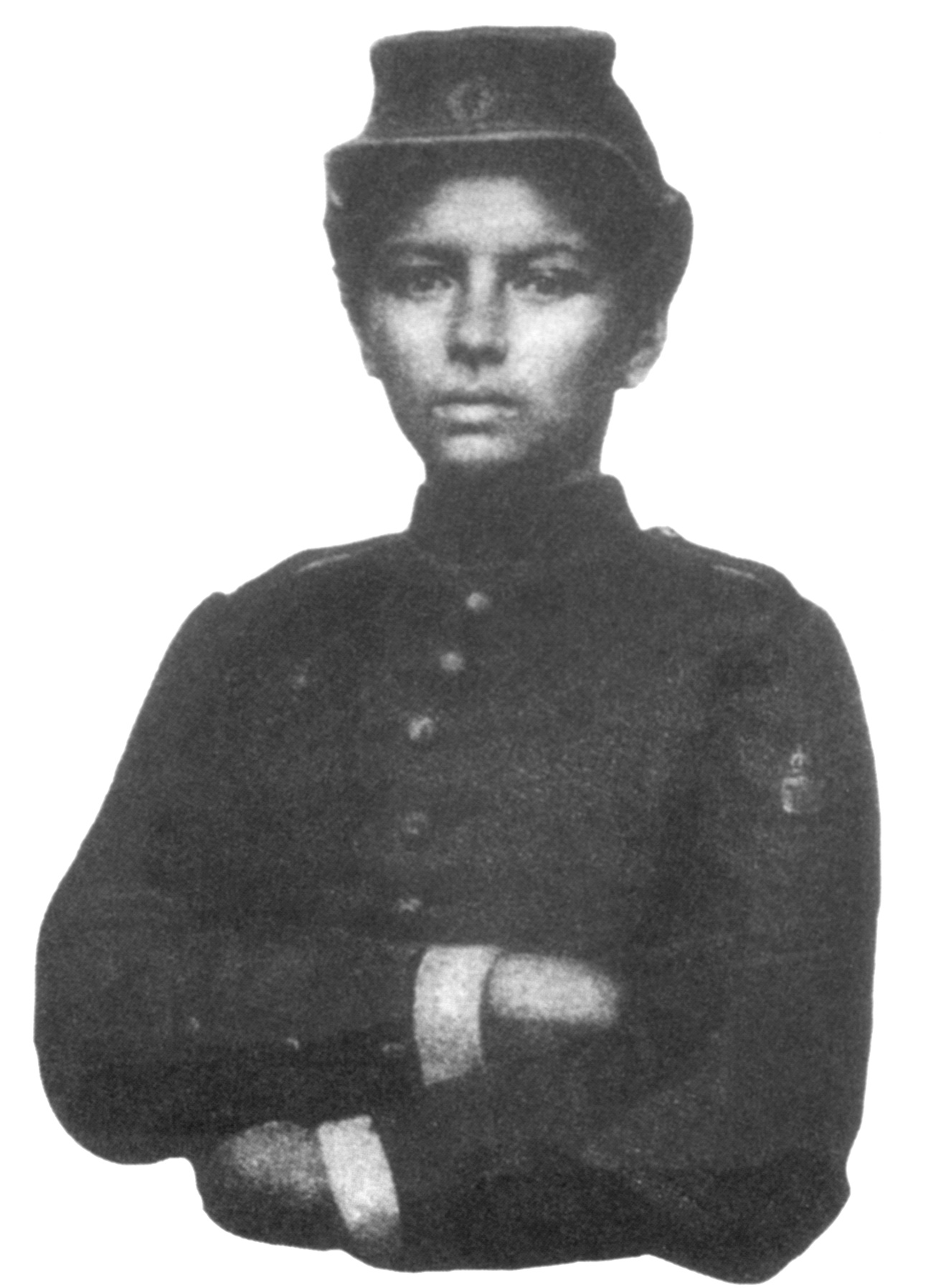 A primeiro-sargenta brasileira na Guerra do Paraguai, Jovita Feitosa.